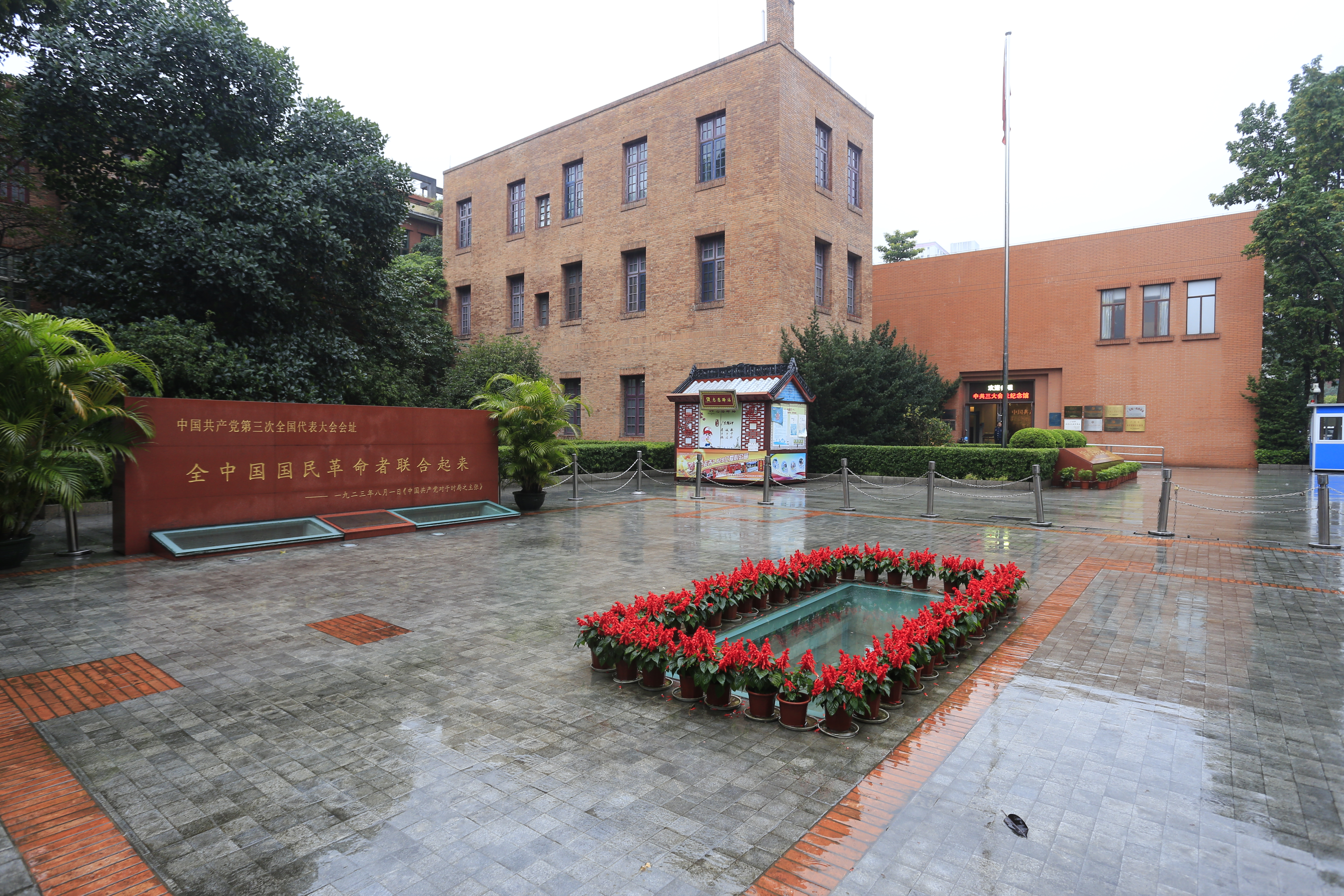 中国共产党第三次全国代表大会会址，位于广州市恤孤院路